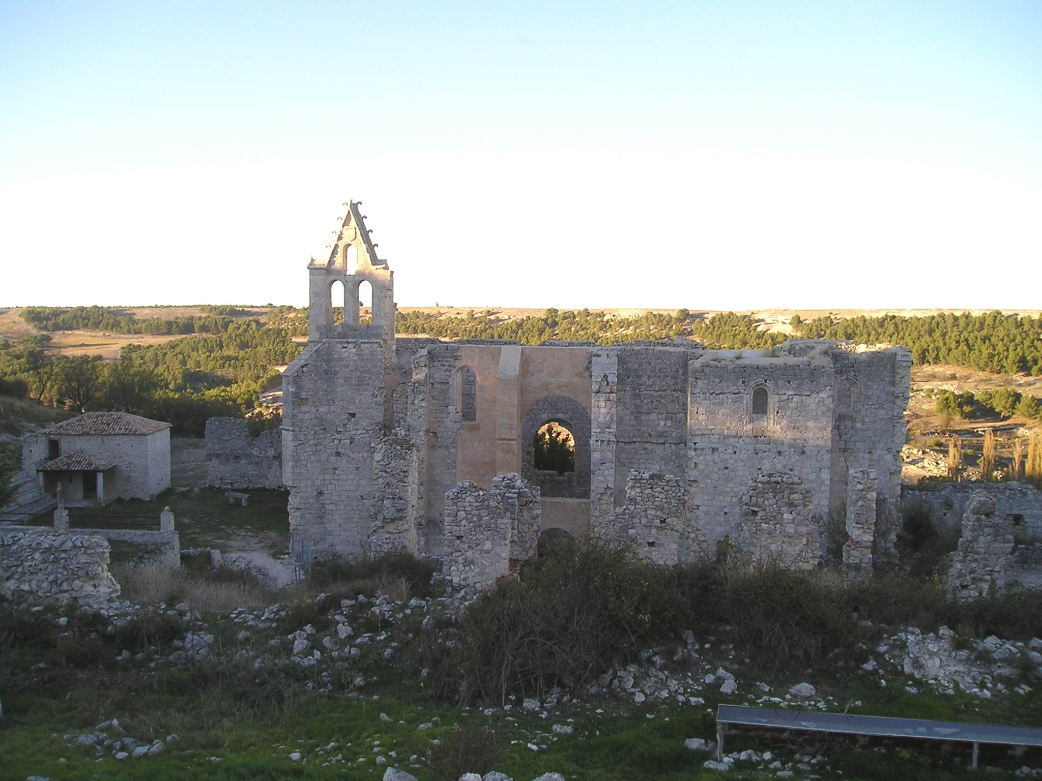 Otra de la iglesia